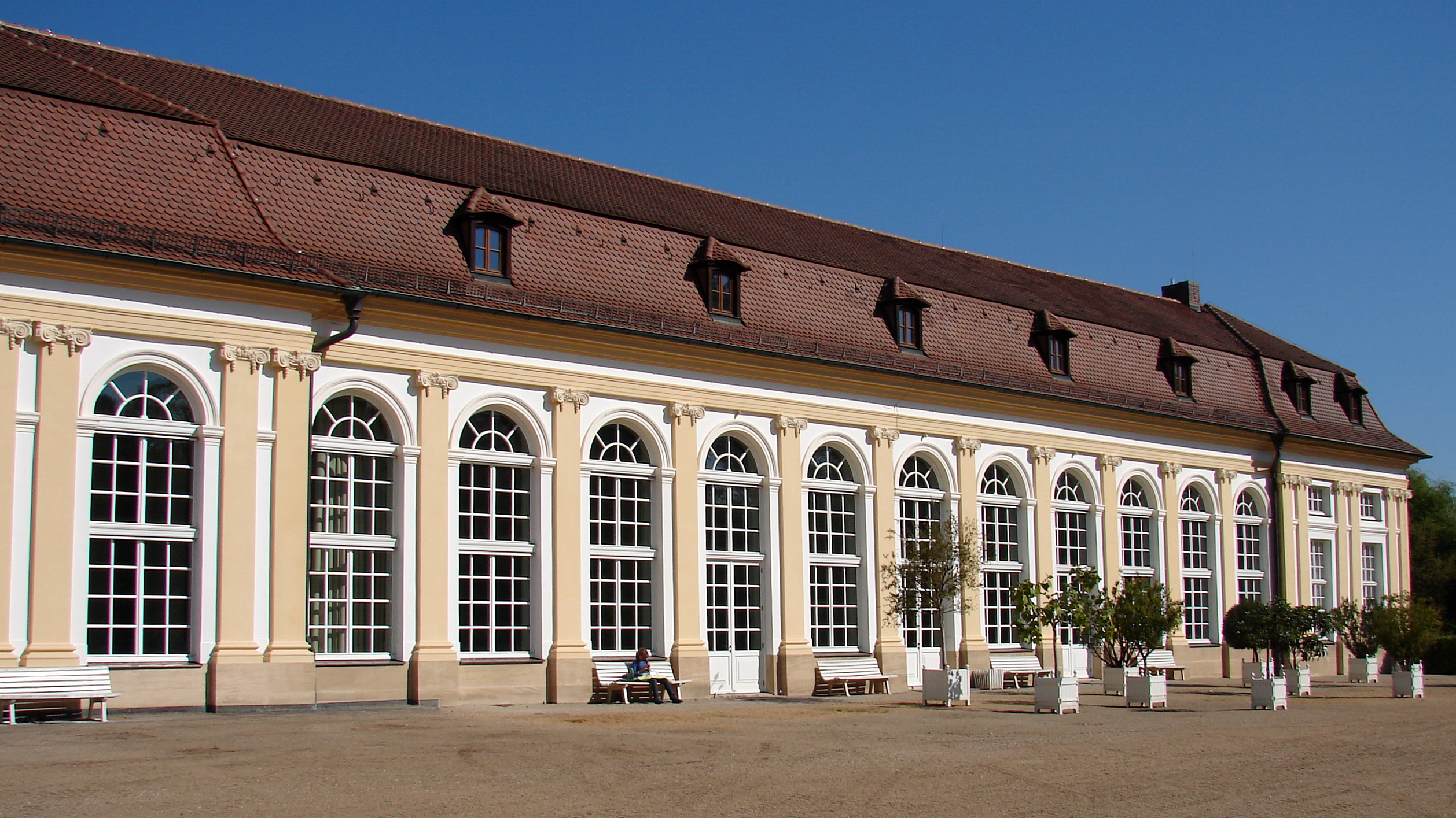 Langgestreckter Baukörper mit dreifacher Risalitbildung, Pilasterordnung und Kolonnaden an der Nordseite, erbaut von Karl-Friedrich von Zocha, 1726-28, Innenausbau und Veränderungen durch Leopoldo Retti, Mansarddach 1760